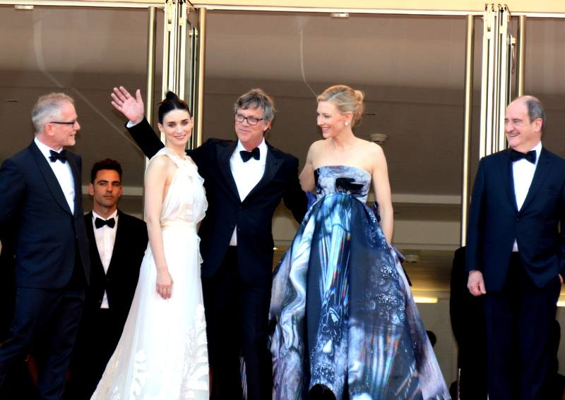 Rooney Mara, Todd Haynes et Cate Blanchett (entourés de Thierry Frémaux et Pierre Lescure) lors de la présentation de "Carol" au festival de Cannes